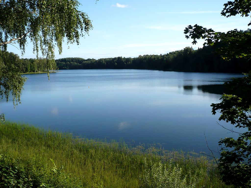 Озеро Дридзис.